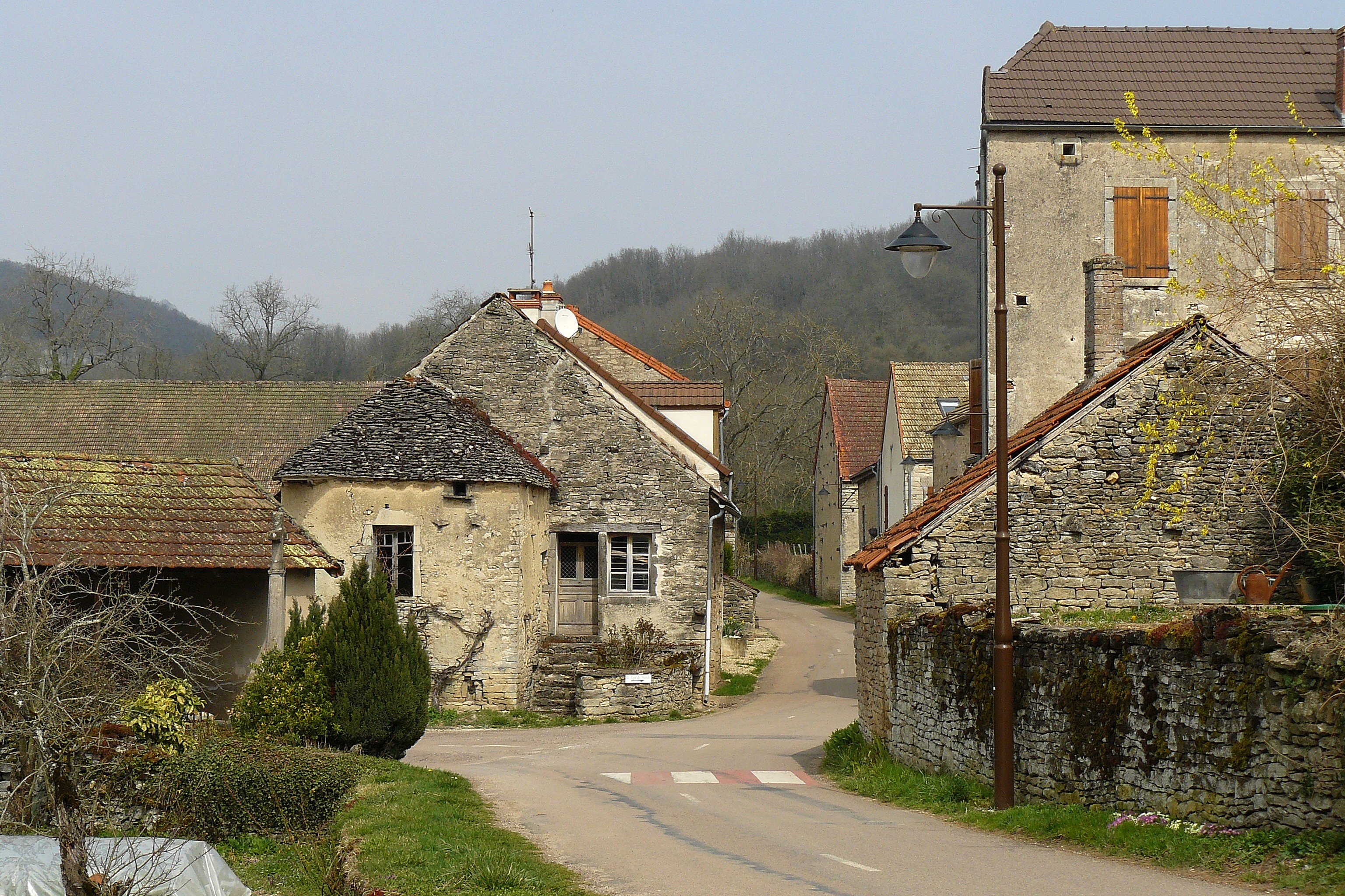 Vauchignon (Côte-d'Or, France)